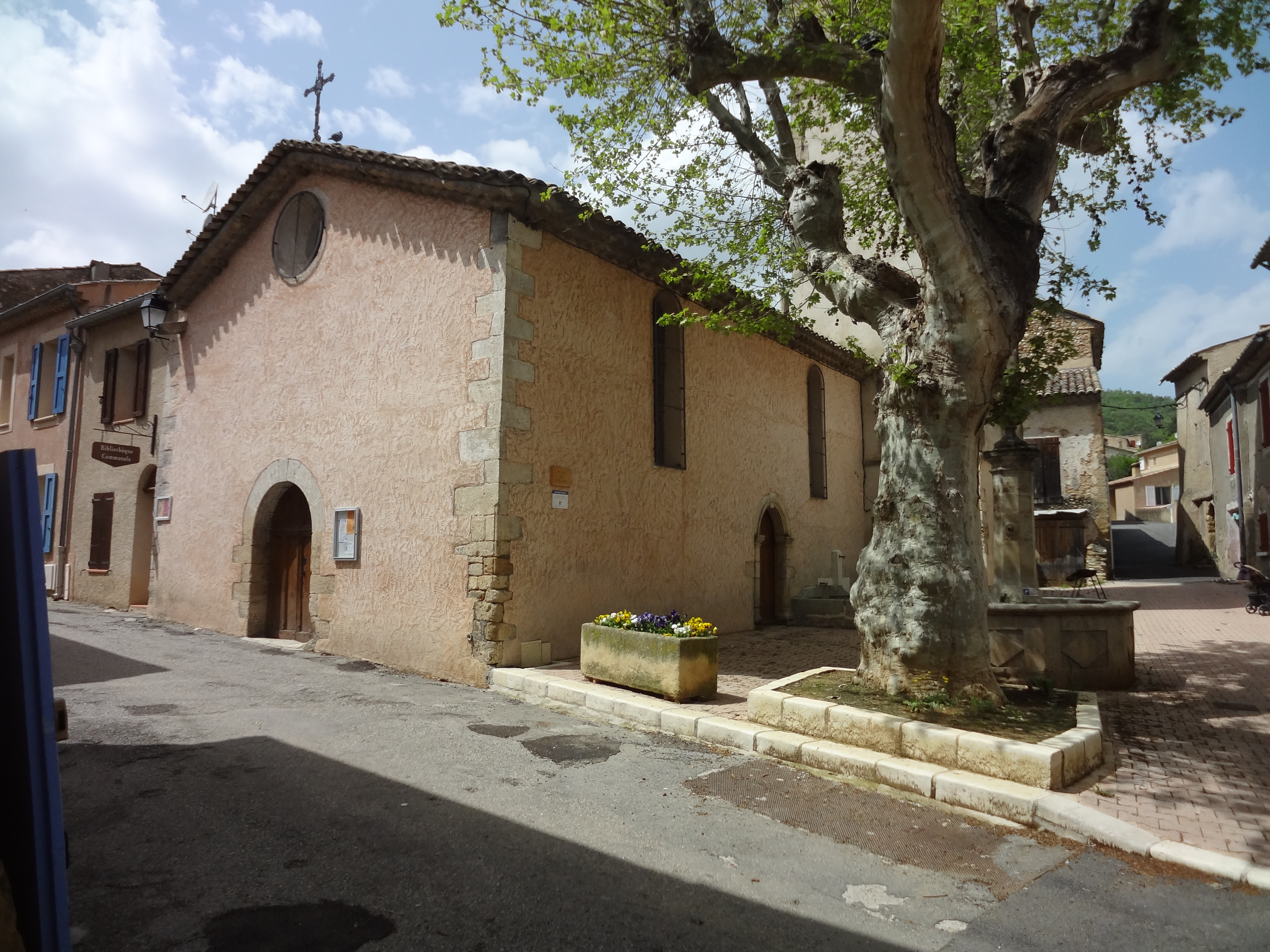 Église St Pierre (Le Castellet)-Façade